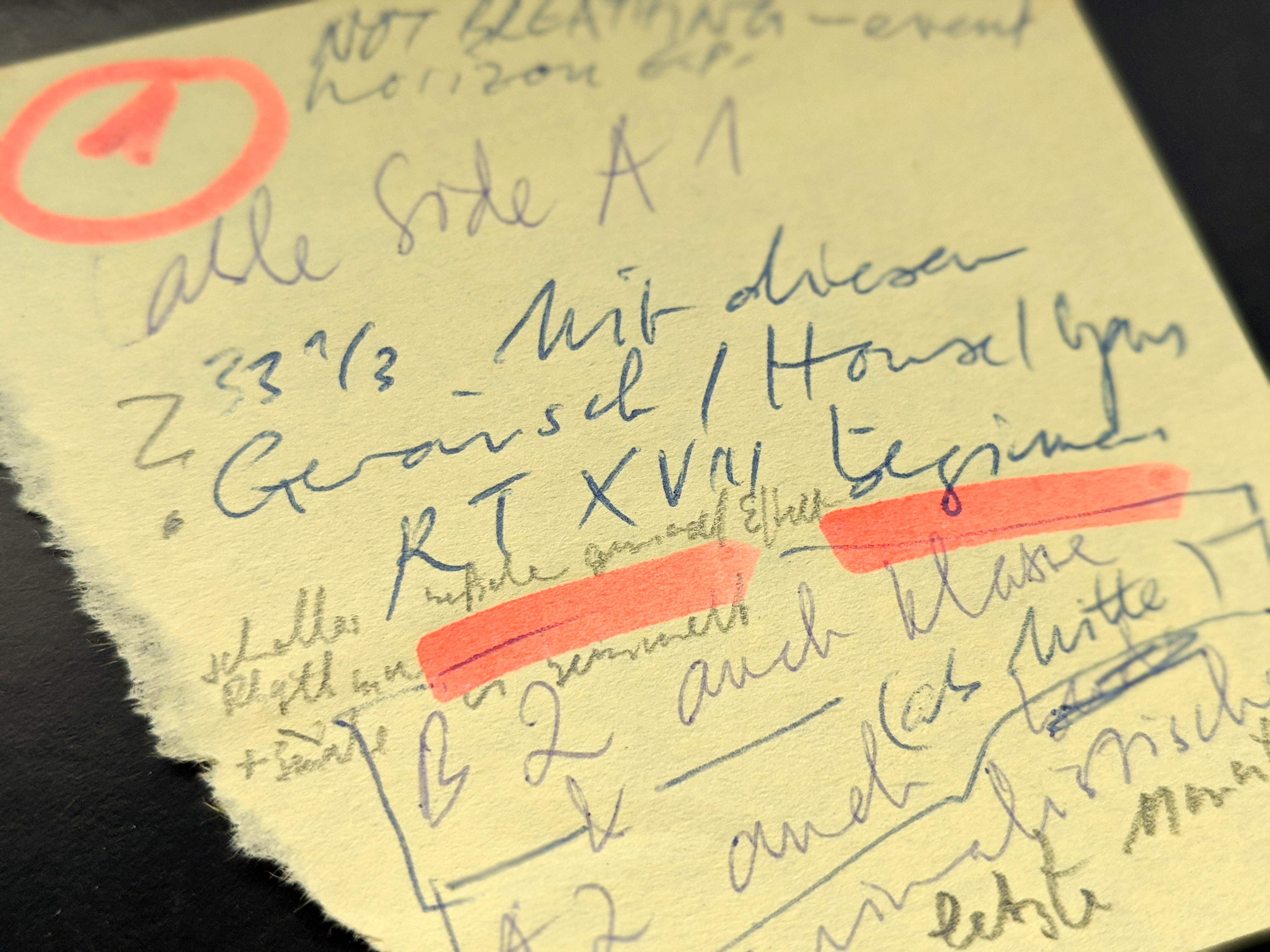 Zündfunk Radiotop PostIt-Aufkleber auf einer Techno-Schallplatte, aus der 18. Sendung. Der Moderator hat die Tracks vermerkt, die er für geeignet fand. Die Schallplatte war in diesem Fall eine frisch gepresste Drum & Bass-Platte, bei der die Abspielgeschwindigkeit nicht klar war. Deswegen ist sie hier mit 33 1/3 vermerkt. Die Nummer der Sendung 18 wurde immer in römischen Zahlen notiert, hier also XVIII.